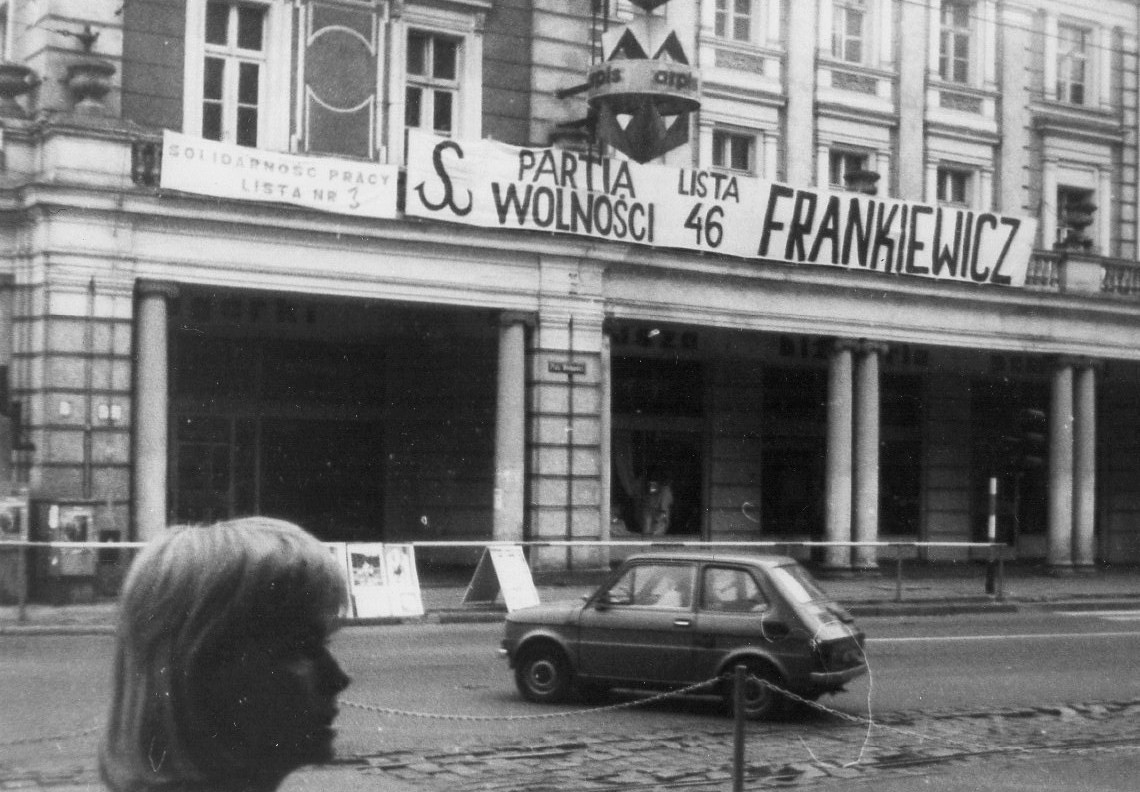 Poznań przed wyborami. Październik 1991r.